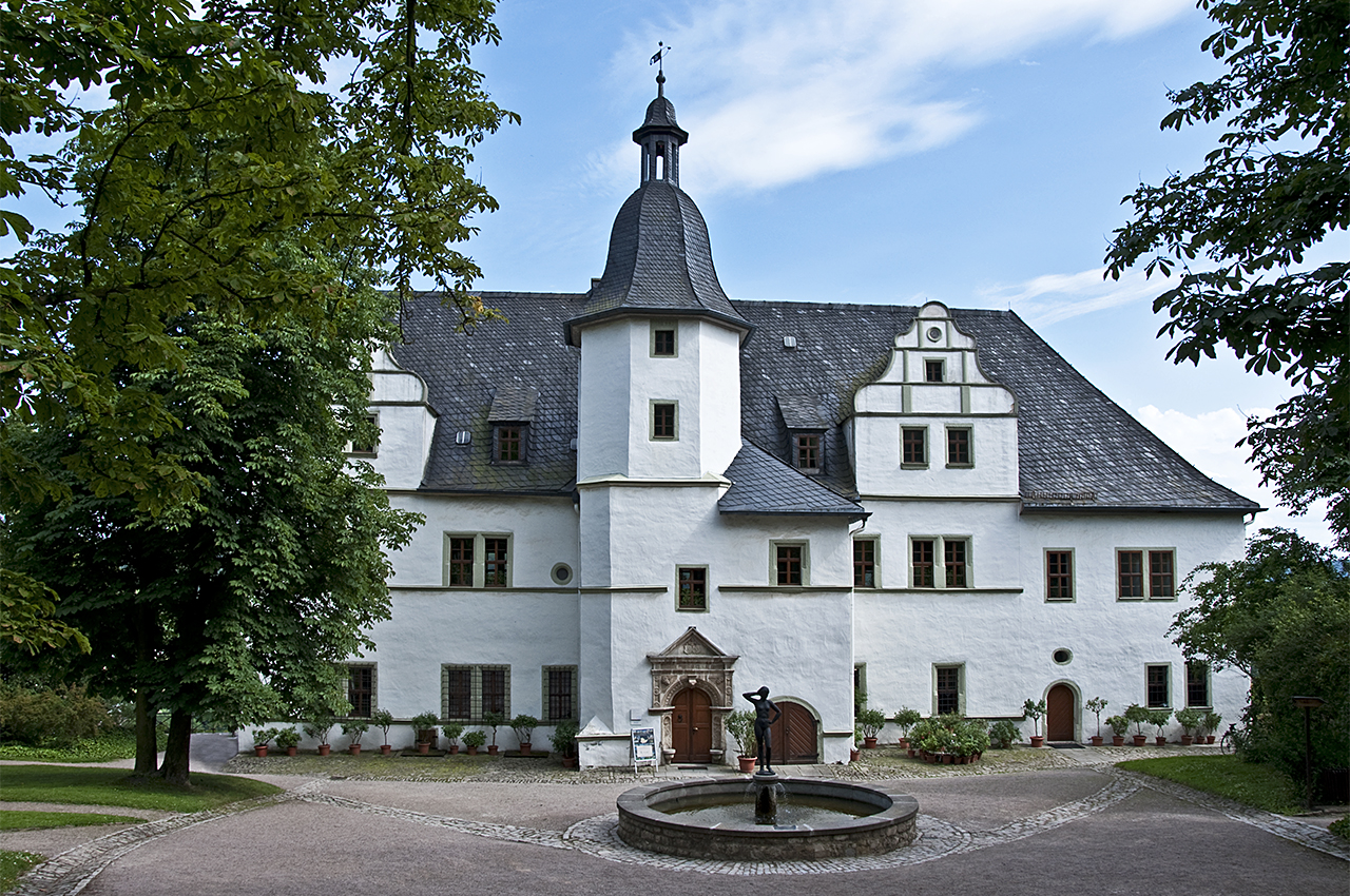 Dornburger Schlösser, Renaissanceschloss, 2009